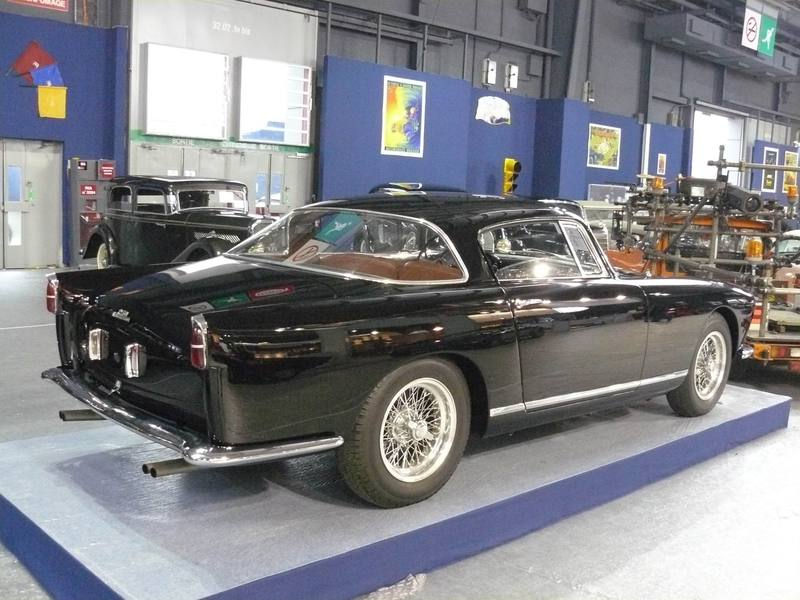 Retromobile 2012